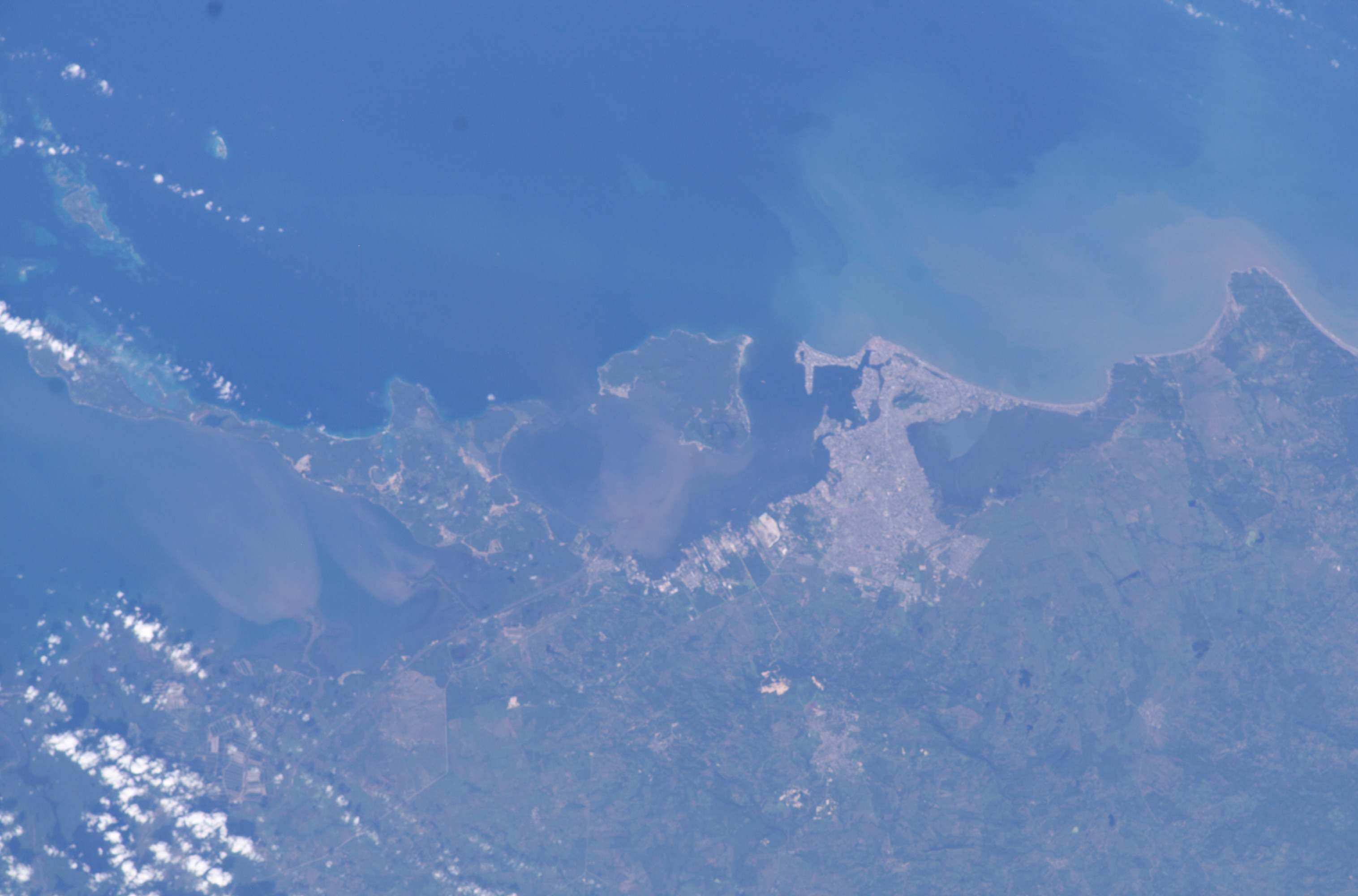 Cartagena, Kolumbien aus dem All